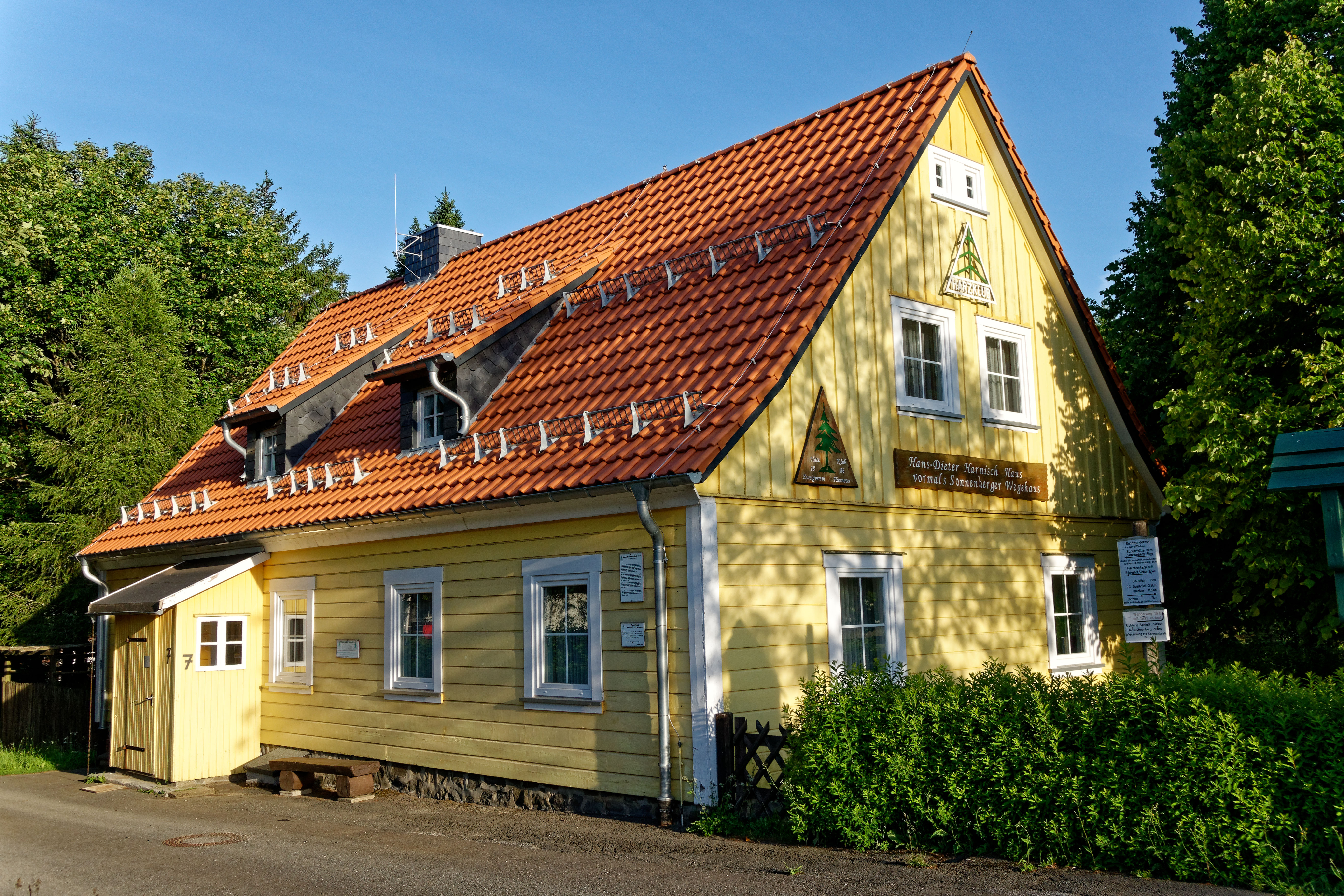 Hans-Dieter Harnisch Haus des Harzklub-Zweigvereins Hannover in Sonnenberg